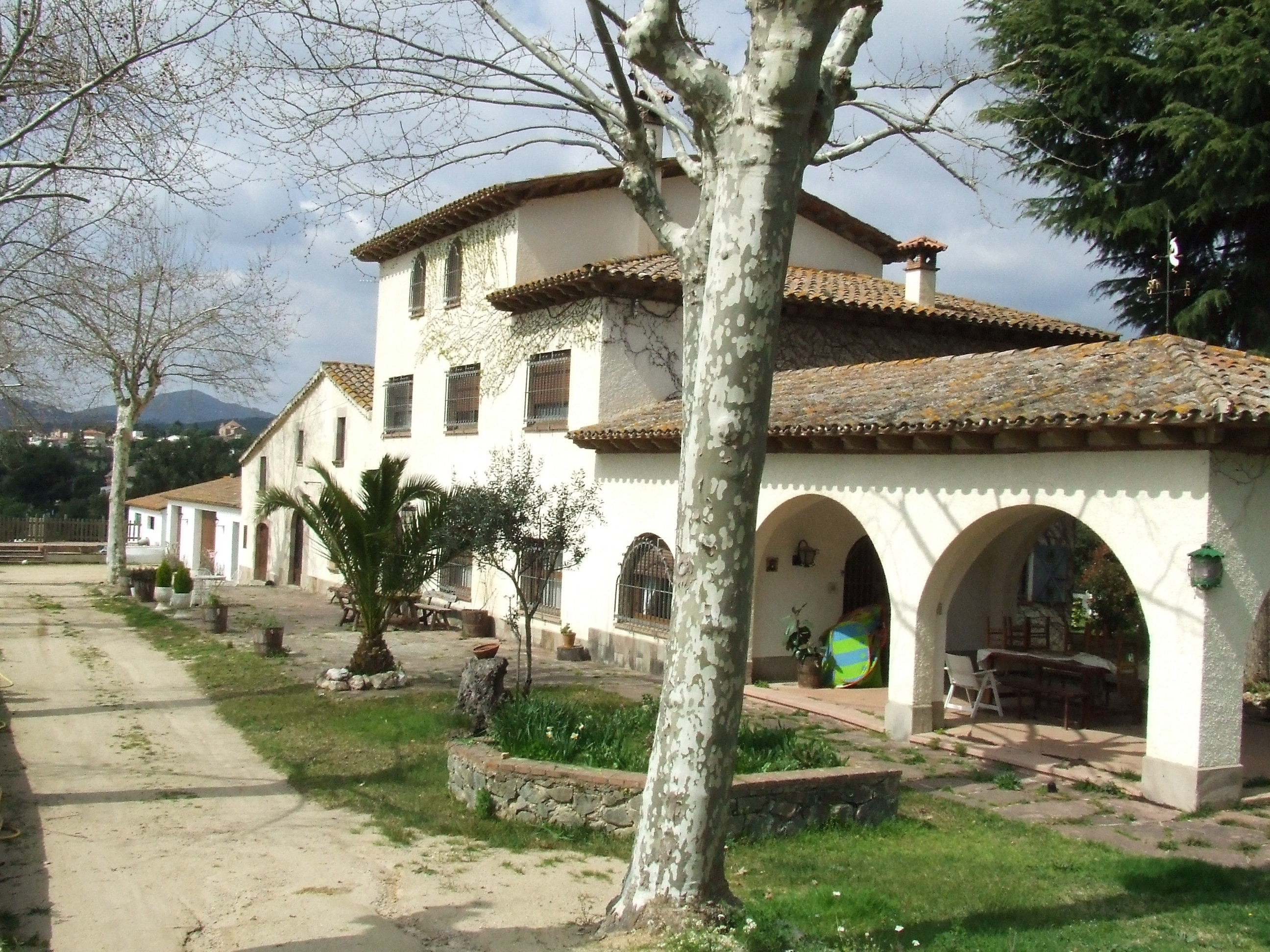 Can Gresola (Bigues, Bigues i Riells, Vallès Oriental)